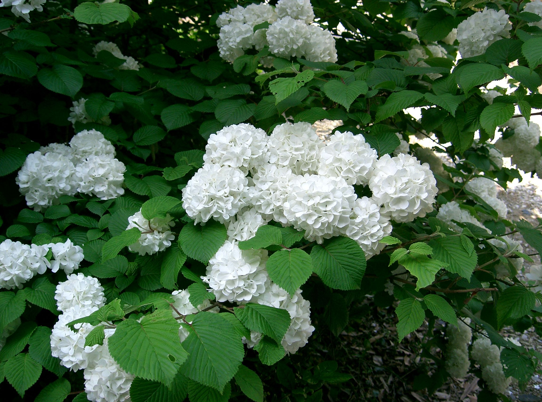 Viburnum plicatum var. plicatum